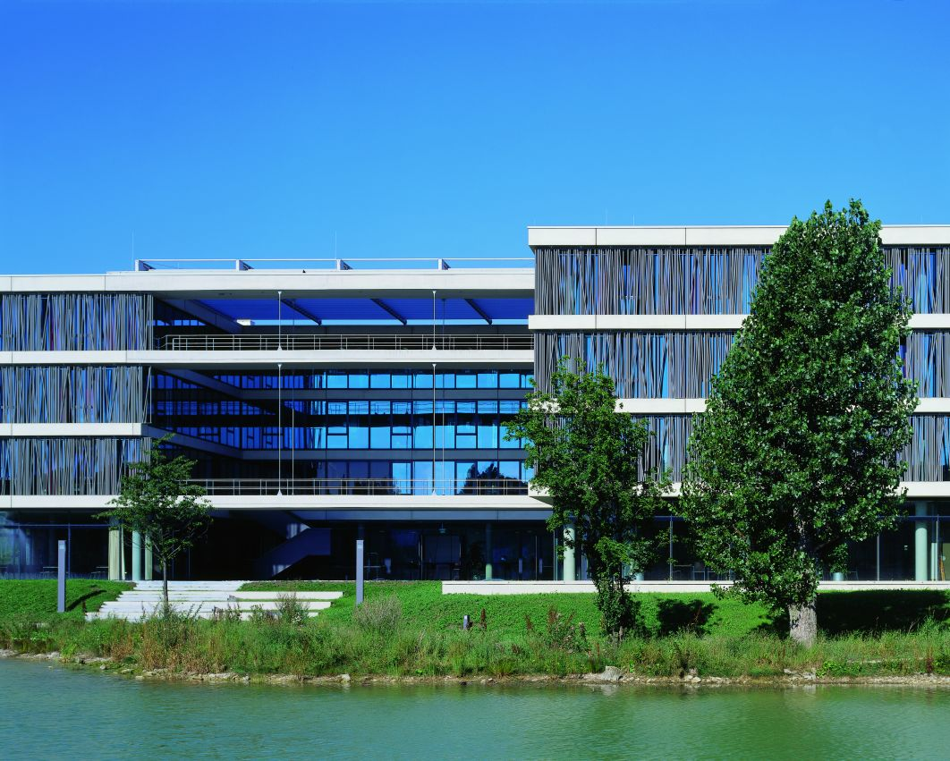 Die Zentrale der Schwenninger Krankenkasse in Villingen-Schwenningen vor ihrer Erweiterung 2018